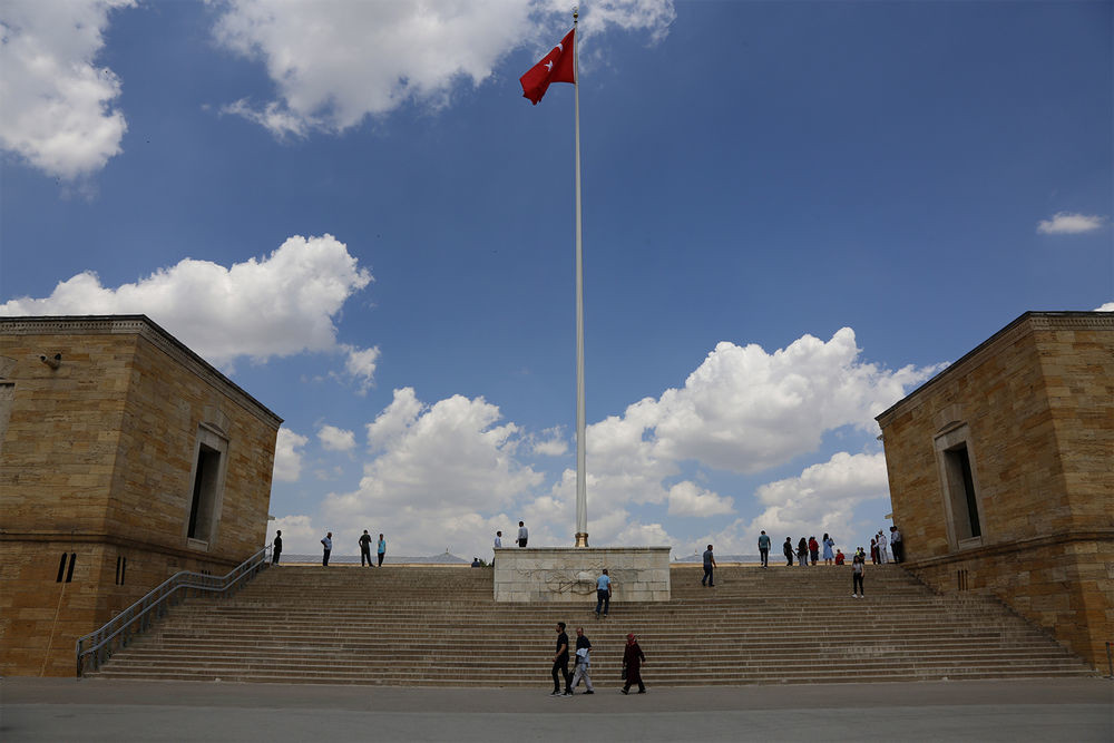 آنیت‌کابیر